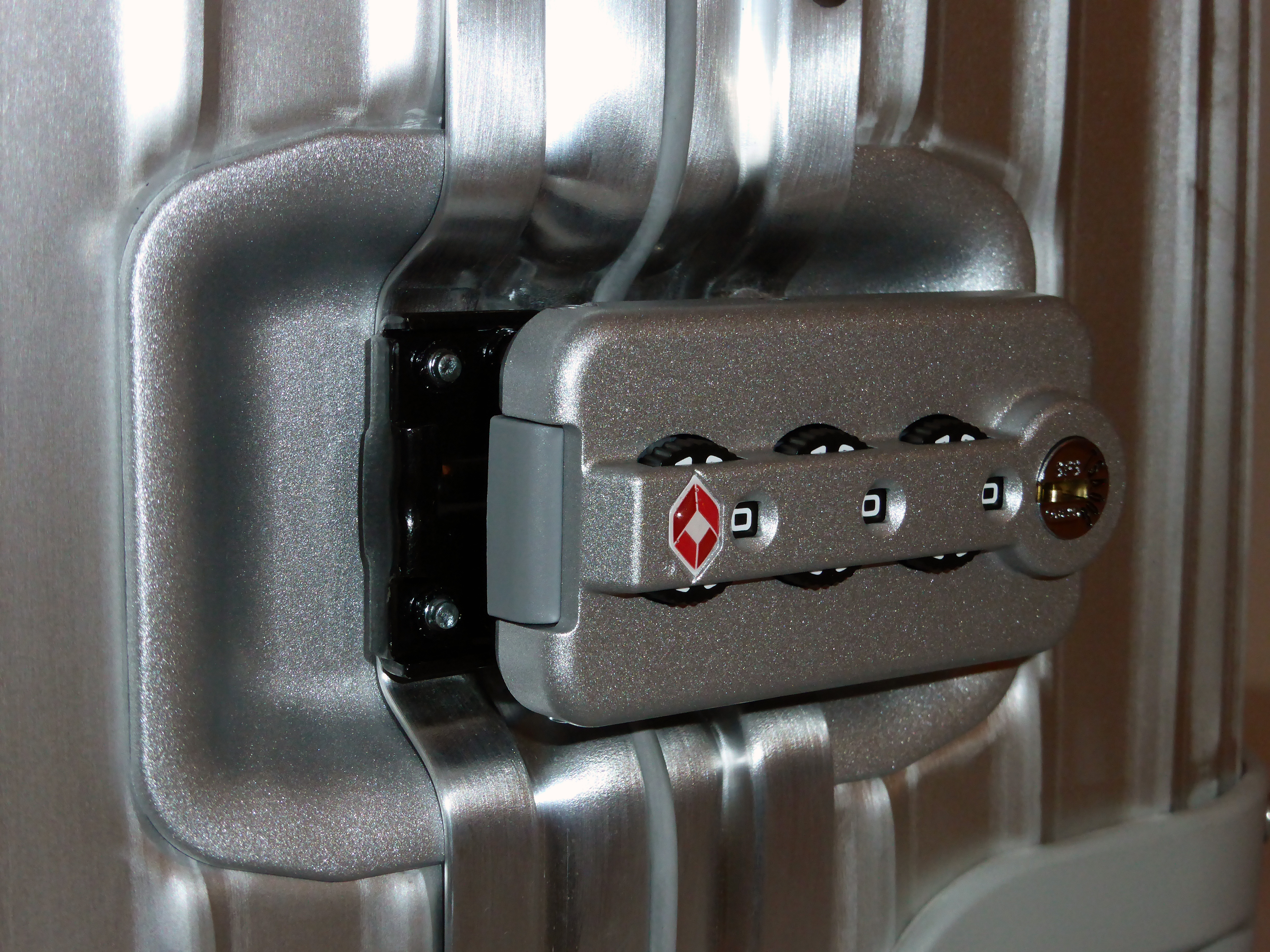 Rimowa-Koffer der Topas-Serie.